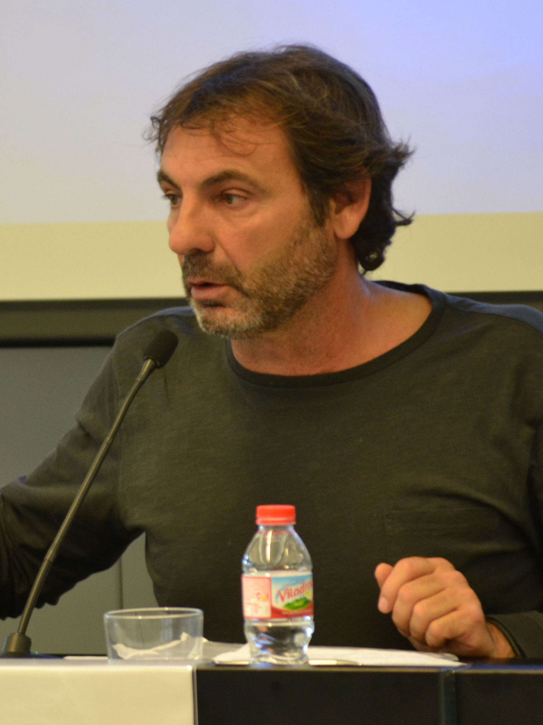 Òscar Camps, de la ONG Proactiva Open Arms, durant una conferència a la Jornada Camins de Llibertat, celebrada al CaixaForum l'octubre de 2017.